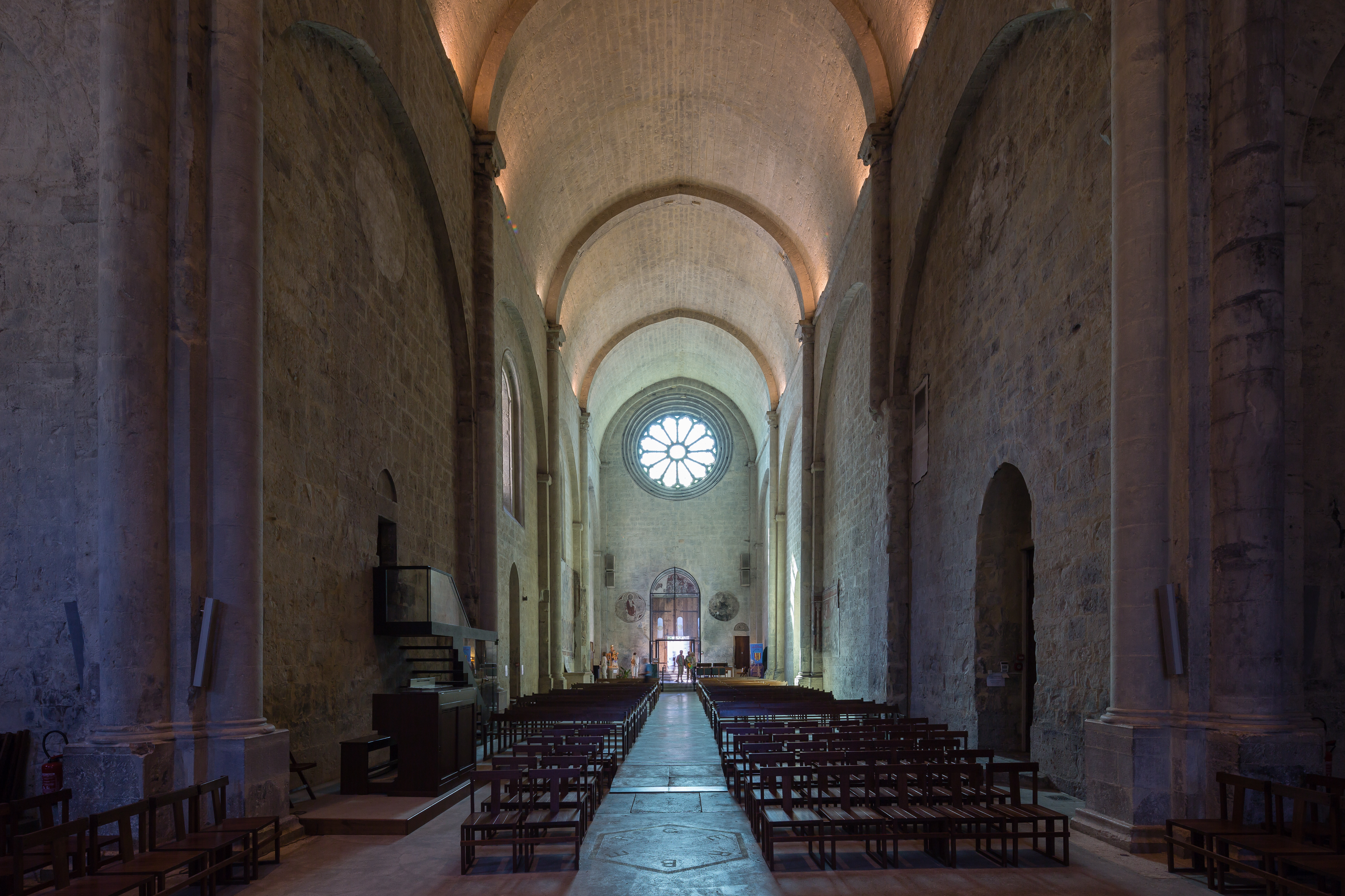 Nef de la cathédrale Notre-Dame-du-Bourg de Digne-les-Bains (France).